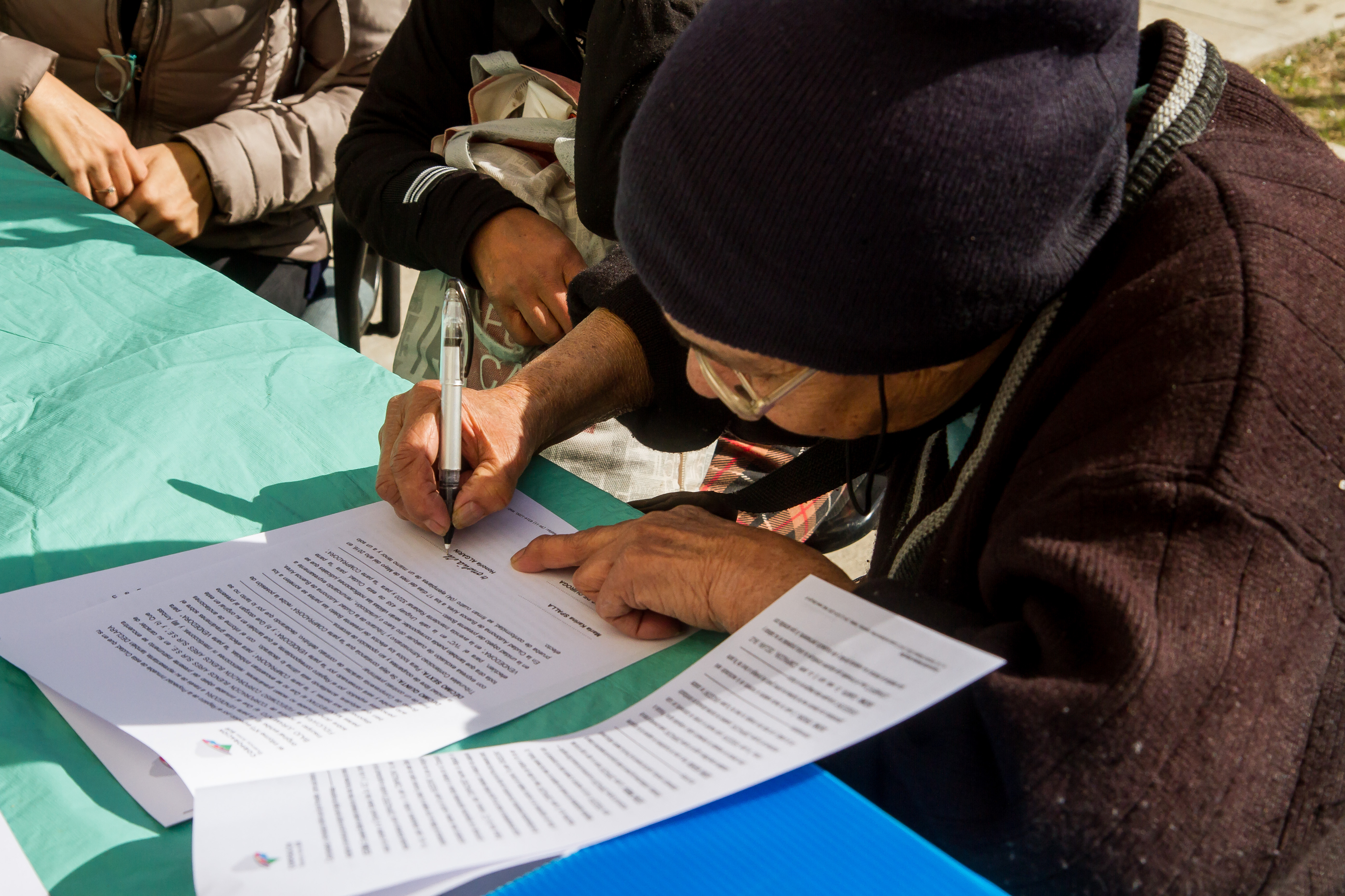 Obras en el barrio Los Piletones, Villa Lugano, Ciudad Autónoma de Buenos Aires.